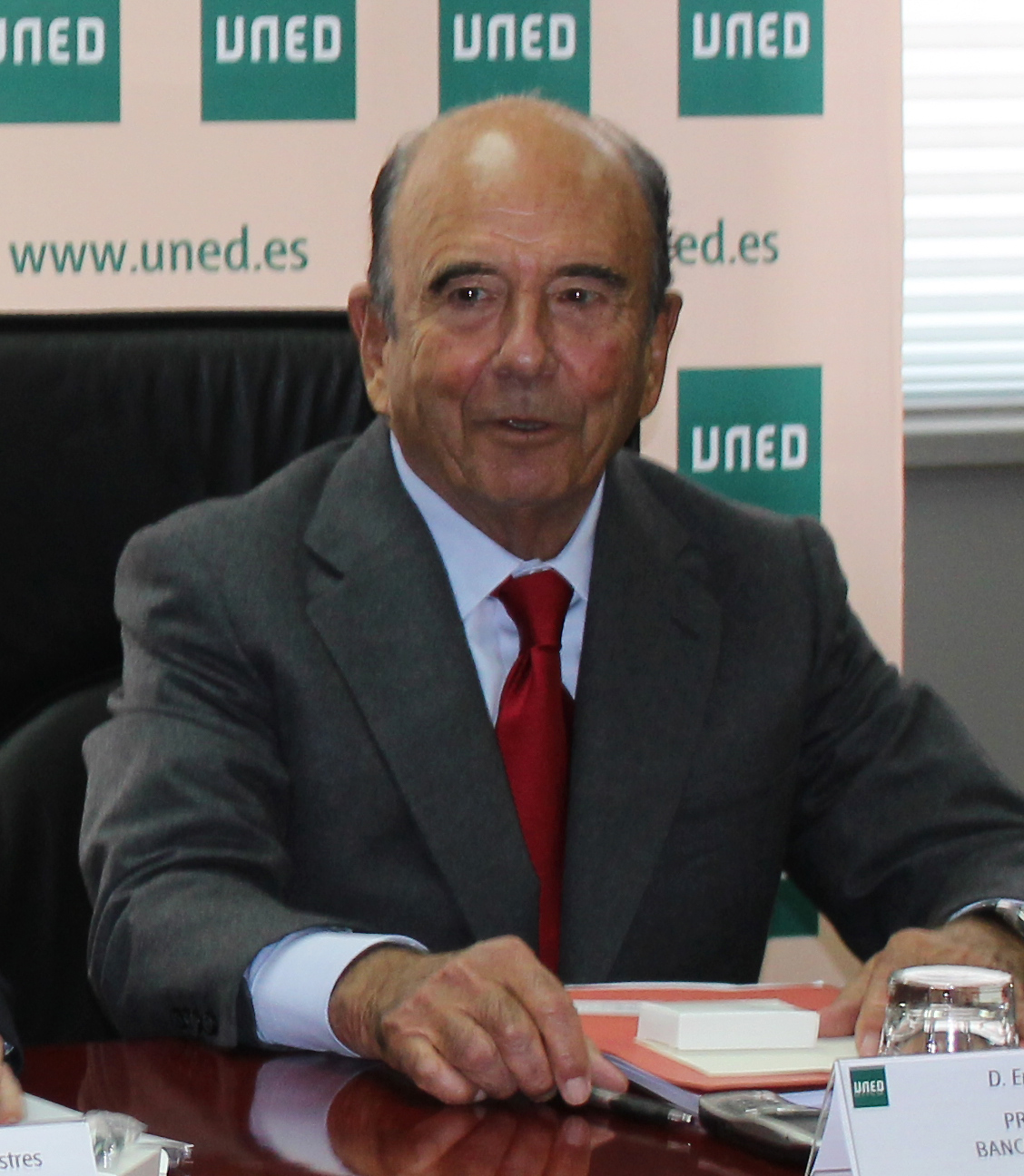 Emilio Botín en la primera reunión de trabajo del Centro Superior de Enseñanza Virtual (5 de julio de 2010)